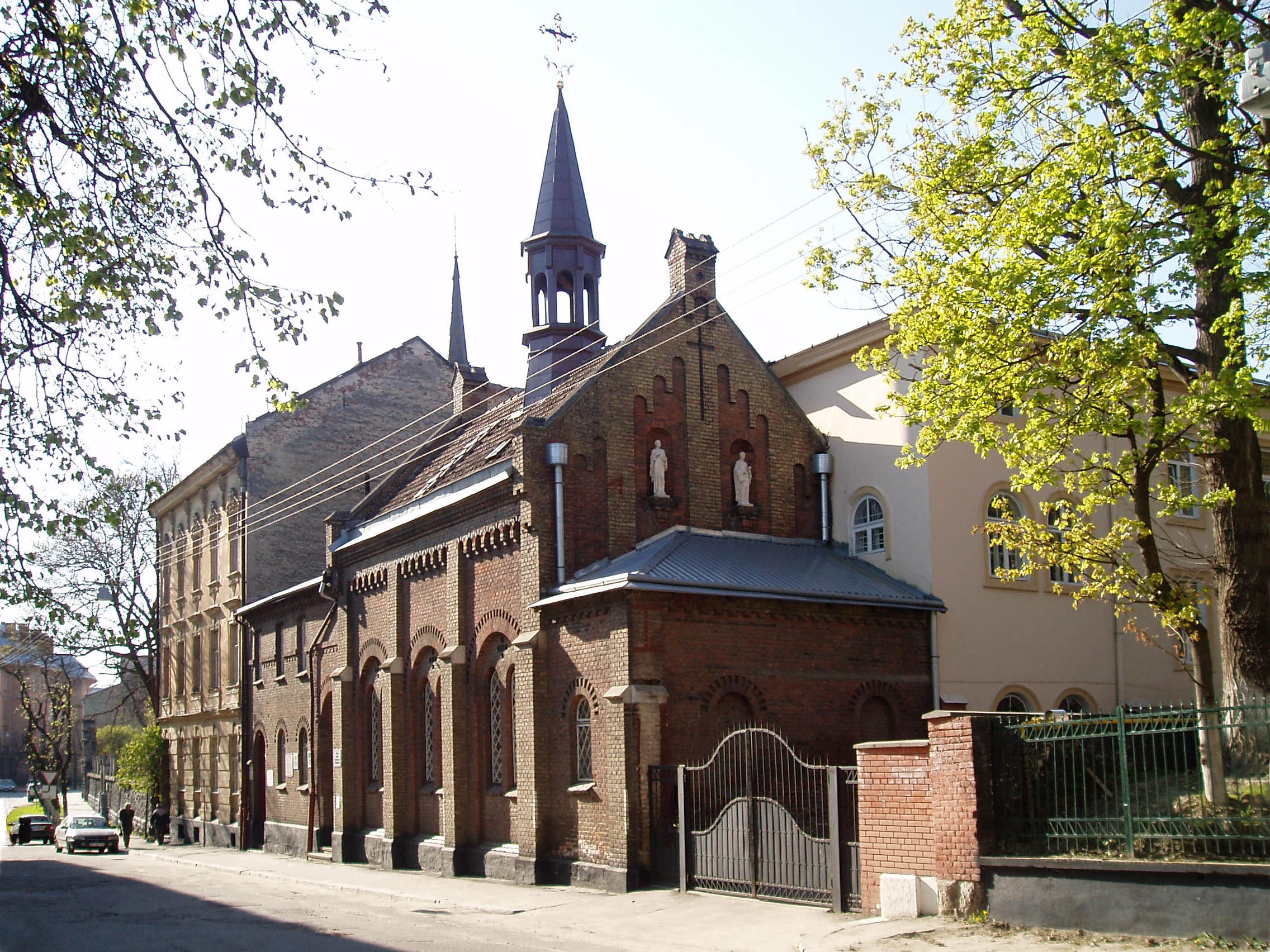 Церква Безсребреників Косми і Дам'яна у Львові, на вул. Лисенка 45. Збудована у 1890 році за проектом Юзефа Каетана Яновського (1832—1914).